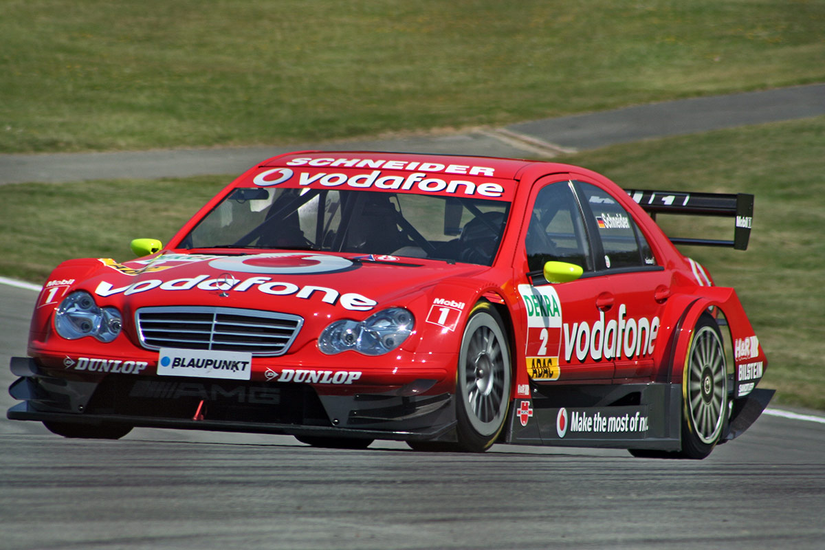 Bernd Schneider driving for Mercedes-Benz in the 2006 Deutsche Tourenwagen Masters season.